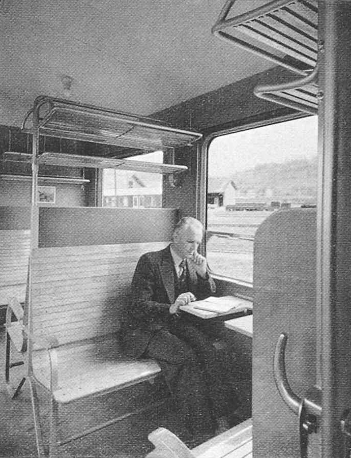 Ursprüngliches Drittklassbteil mit Holzbestuhlung